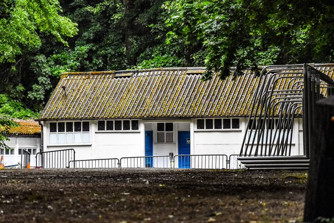 Kantine